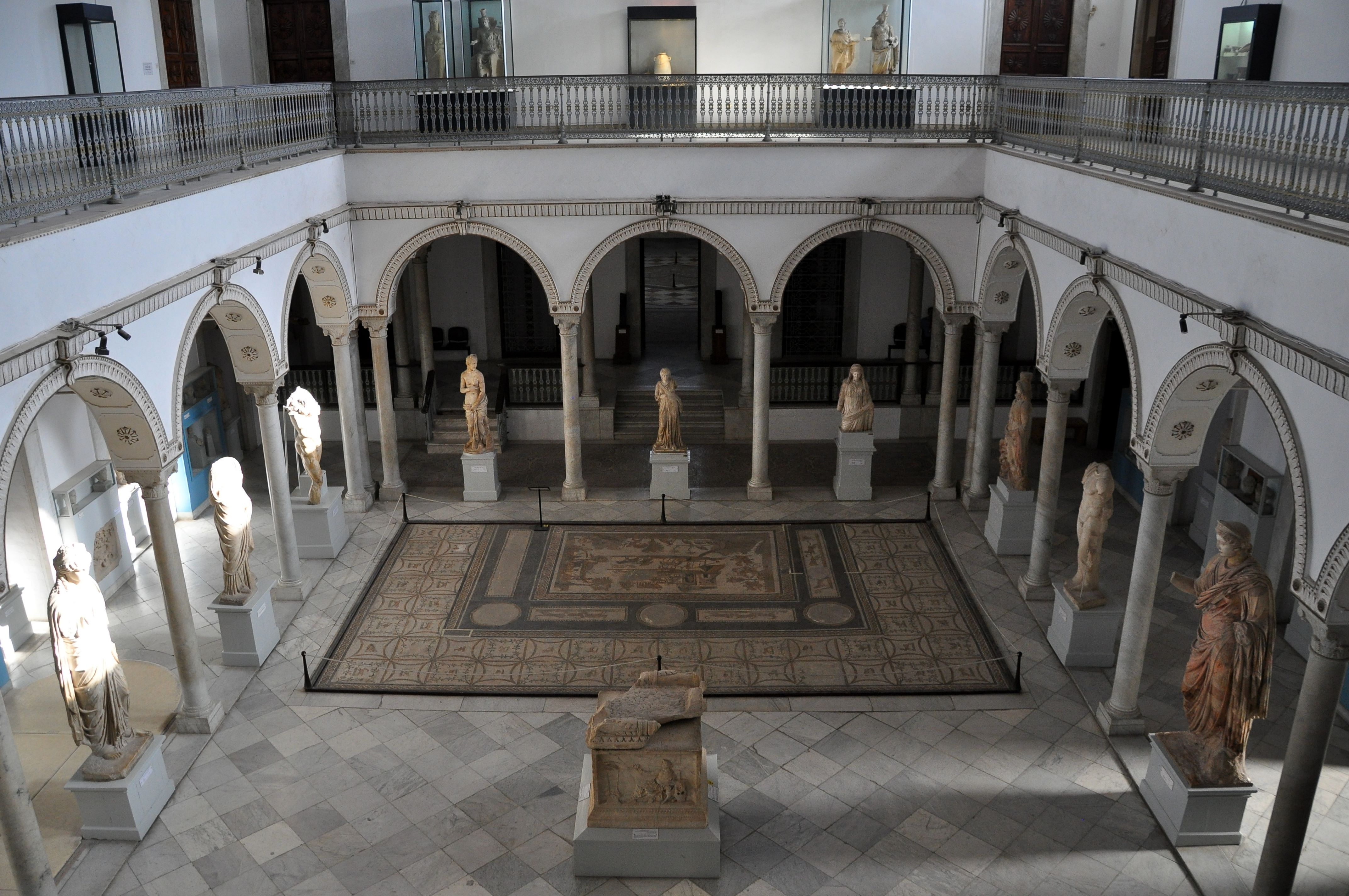 Salle de Carthage au Musée national du Bardo (Tunisie)